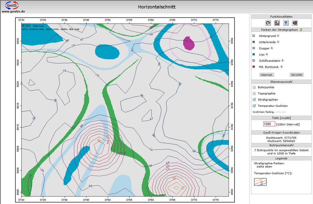 Screenshot aus dem Geothermischen Informationssystem